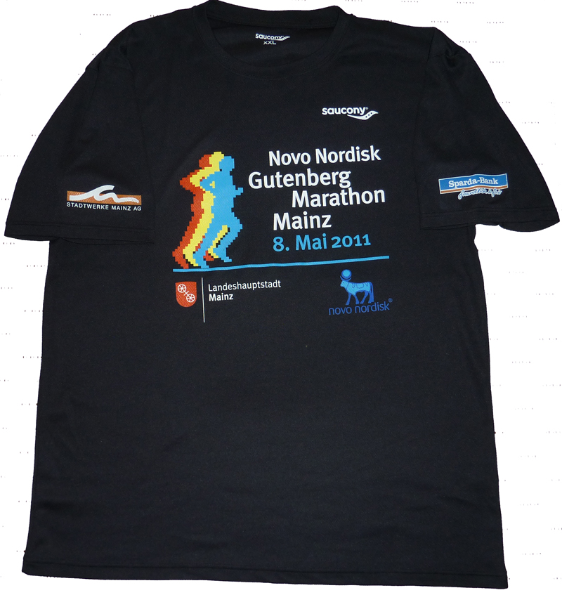 Helfer-T-Shirt für den Gutenberg-Marathon 2011 in Mainz